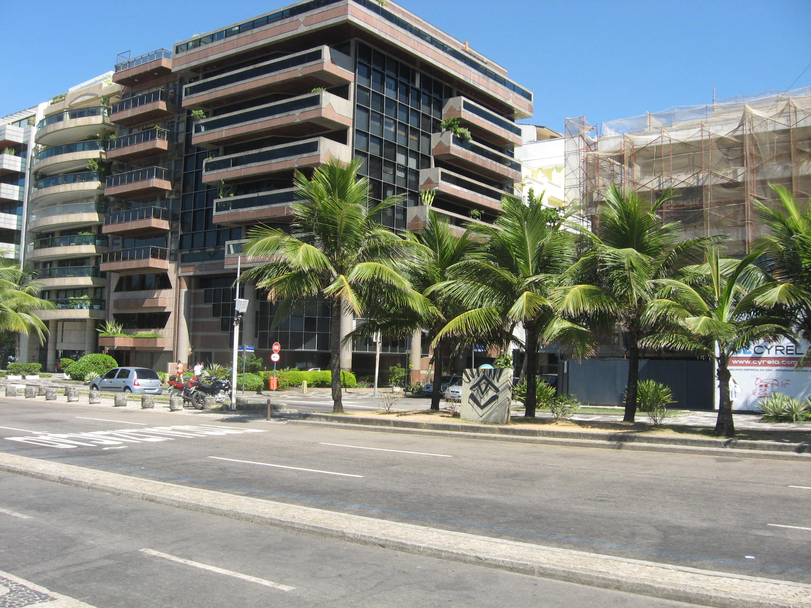 Vista do bairro do Leblon, zona sul da cidade do Rio de Janeiro.